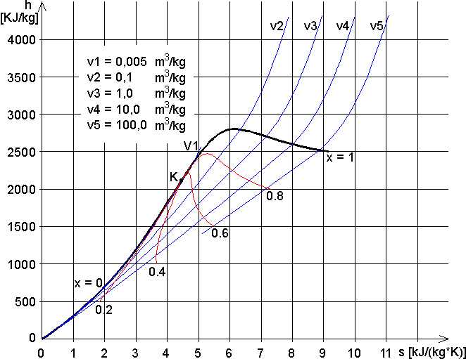 Przebieg krzywych przemiany izochorycznej wody i pary wodnej na wykresie h-s (entalpia - entropia)